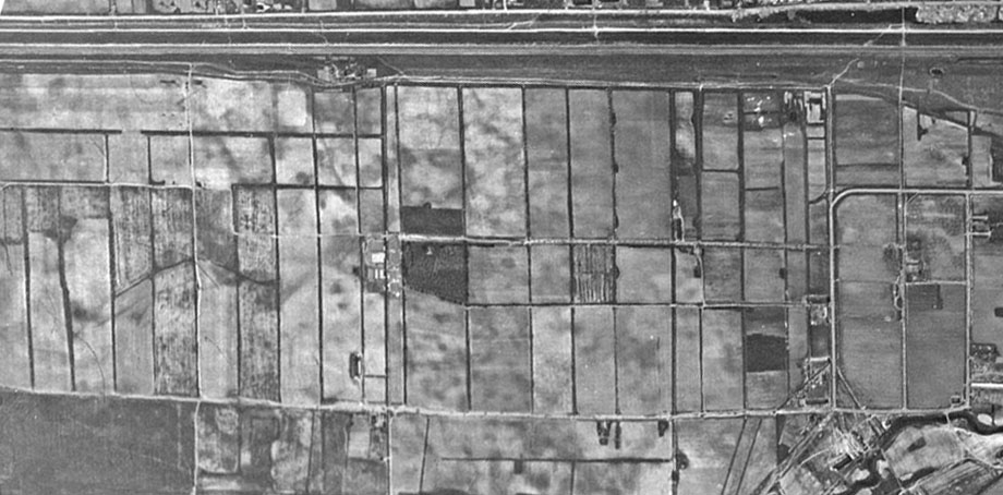 Немецкий аэрофотоснимок Яблоневого сада